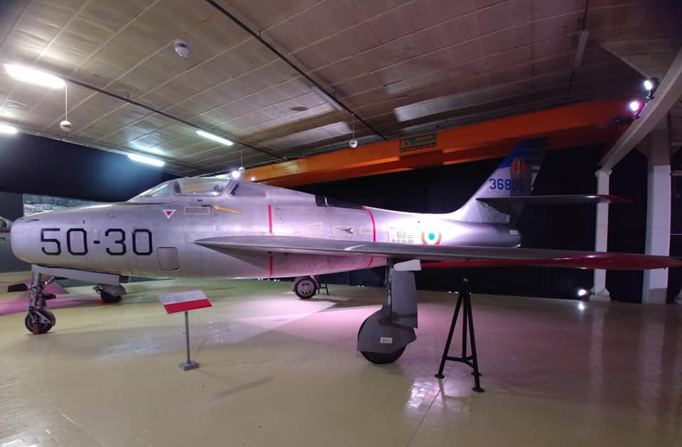 F84 thunderstreak di Volandia